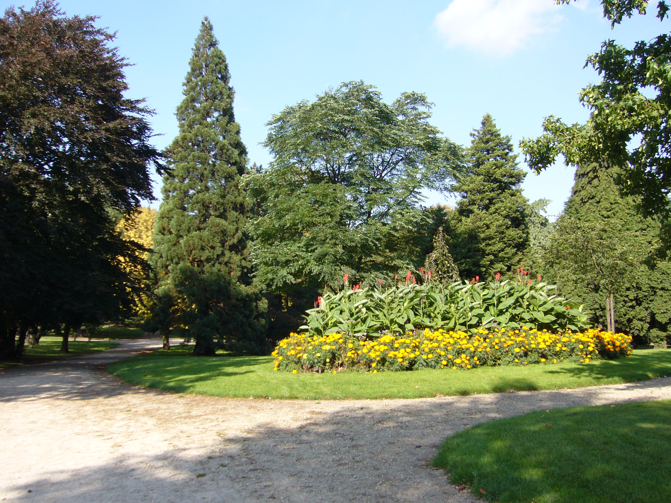 Photo personnelle, une vue du parc de Cointe, du côté de la plaine des sports.